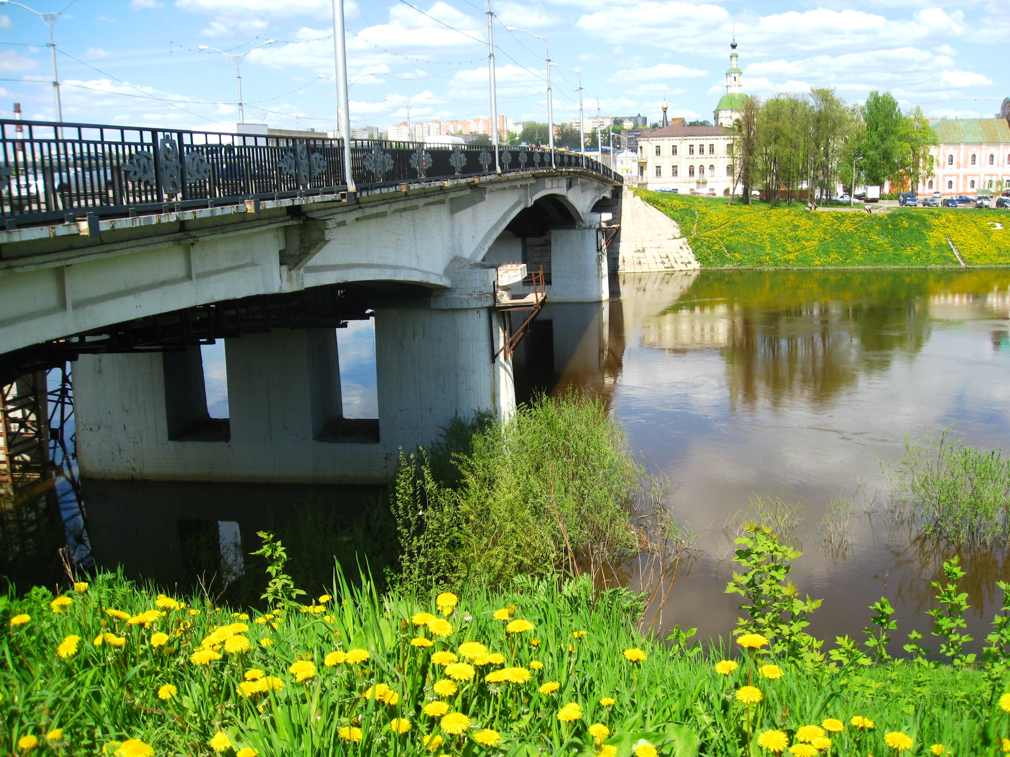 Фотография "Смоленский мост через Днепр" Автор - Печкарева Ирина Борисовна